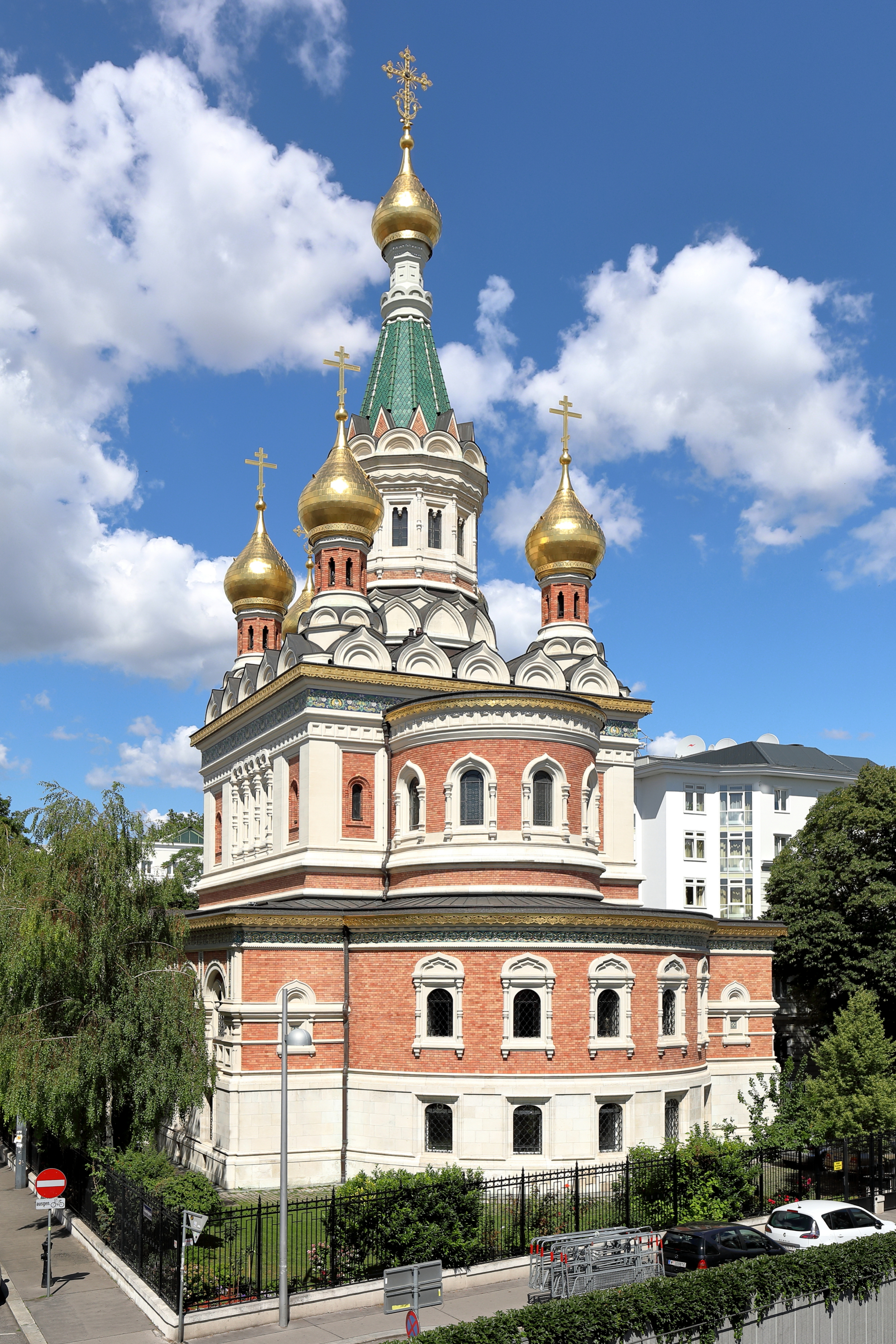 Die russisch-orthodoxe Kathedrale hl. Nikolaus an der Adresse Jaurèsgasse 2 im 3. Wiener Gemeindebezirk Landstraße.Die Kathedrale wurde von 1893 bis 1899 als zweigeschossiger freistehender späthistoristischer Backsteinbau in russisch-spätbyzantinischem Stil nach Plänen des St. Petersburger Architekten Grigorij Iwanowitsch Kotov vom italienischen Architekten Luigi Ritter von Giacomelli als Botschaftskirche errichtet.